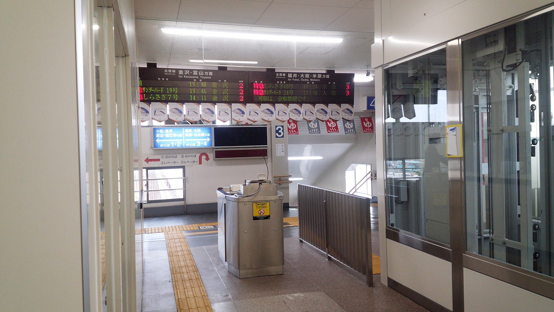 芦原温泉駅改札口